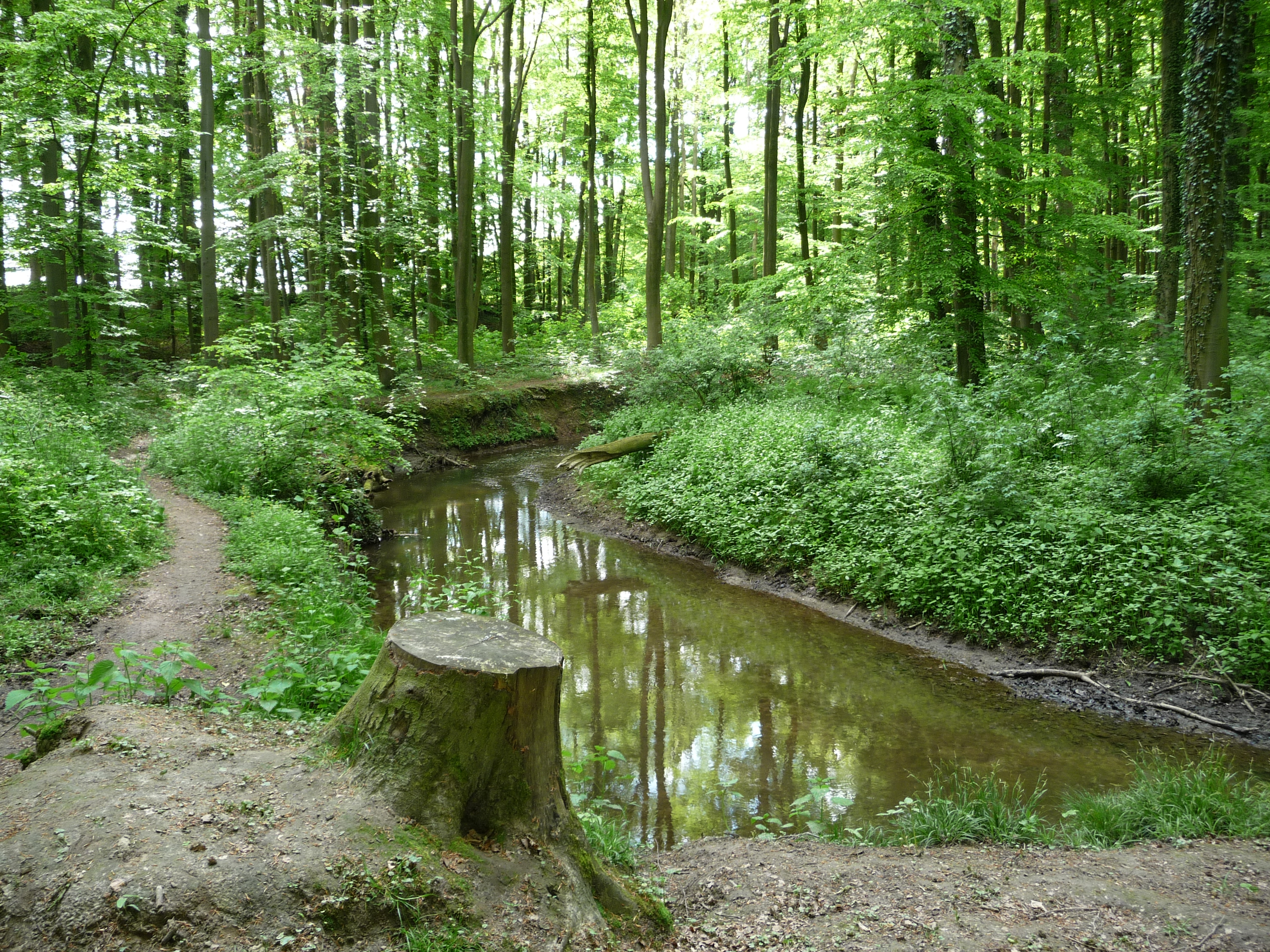 Waldgebiete zwischen Dielingdorf und Handarpe. Am Ausgang befindet sich ein kleines offenes Gebiet mit einer Holzbrücke über dem Fluß Violenbach und Wanderwegen.